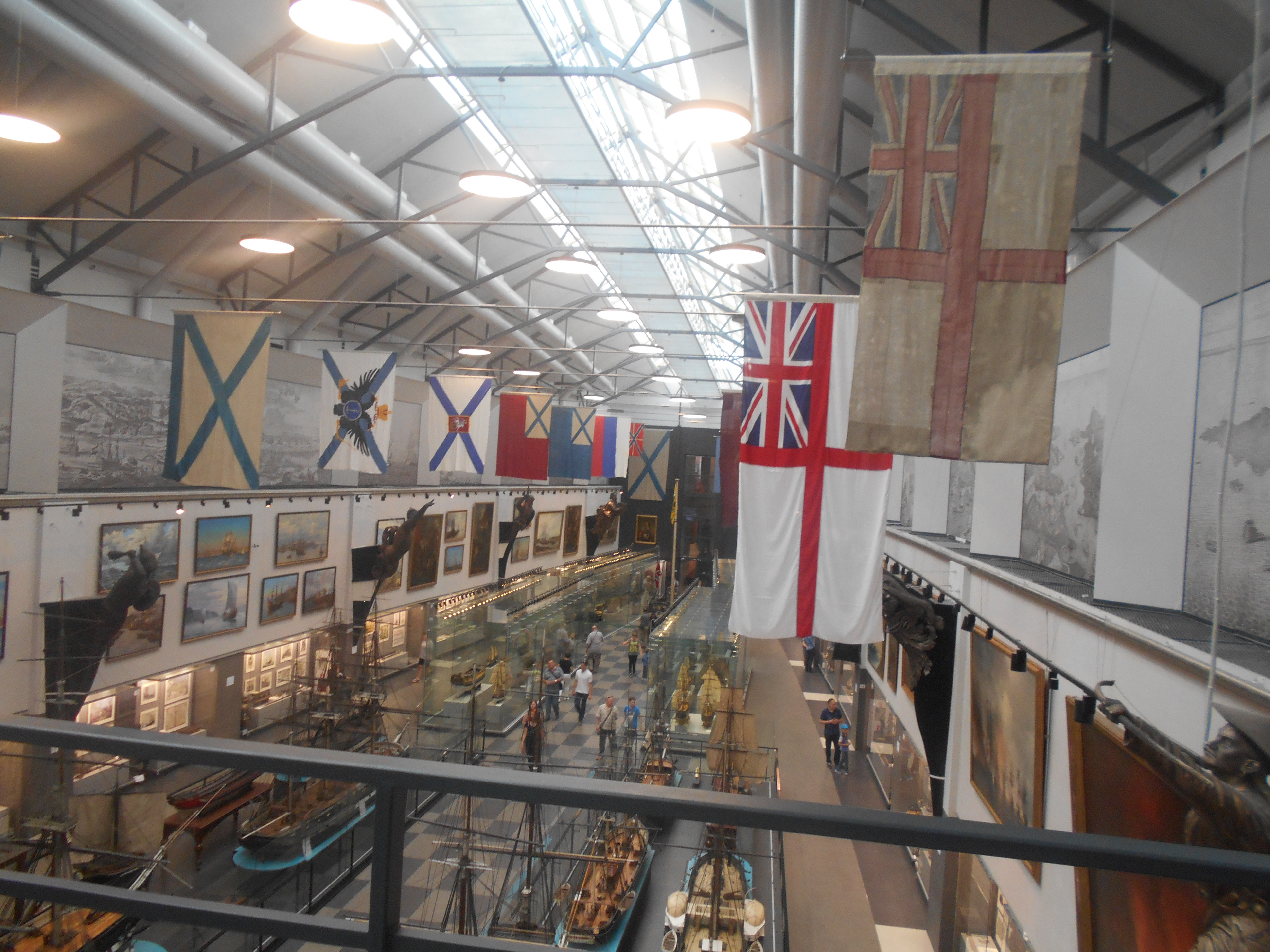 Музей